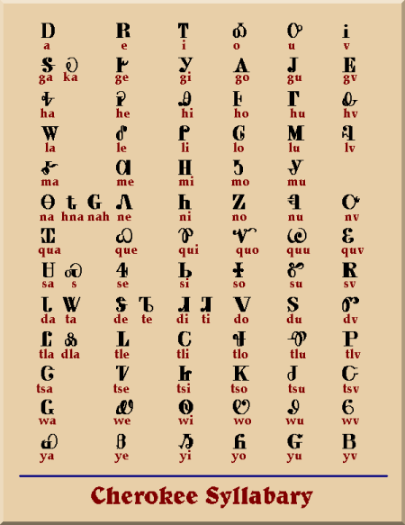 Cherokee syllabary - alfabet Indian Czirokezów, twórca: Sekwoja (Sequoyah)